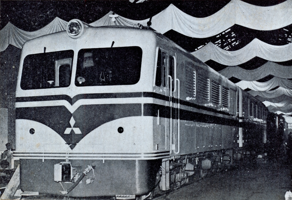 ECAFE（国連アジア極東経済委員会）鉄道展覧会にて展示中の、新三菱重工・DD50形電気式ディーゼル機関車。